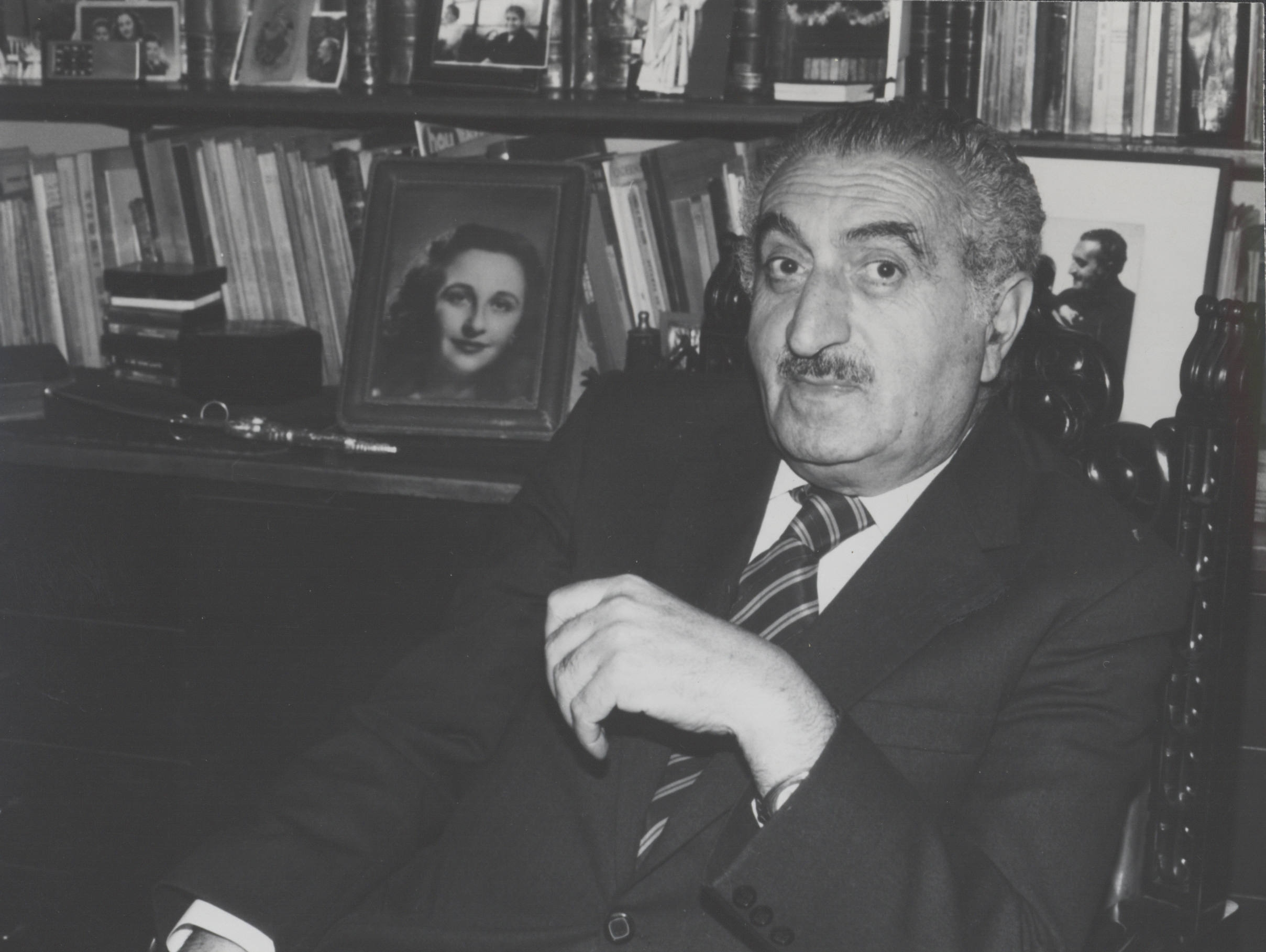 Alejandro Hales en su despacho. A su espalda, parte de su biblioteca y retratos familiares de su esposa Adela Dib e hijos. 1990